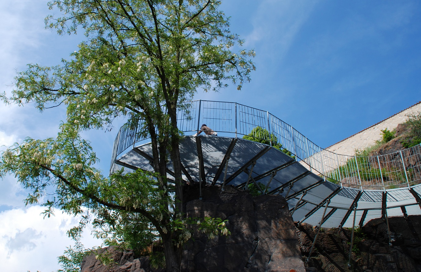 Nábřeží Maxipsa Fíka v Kadani